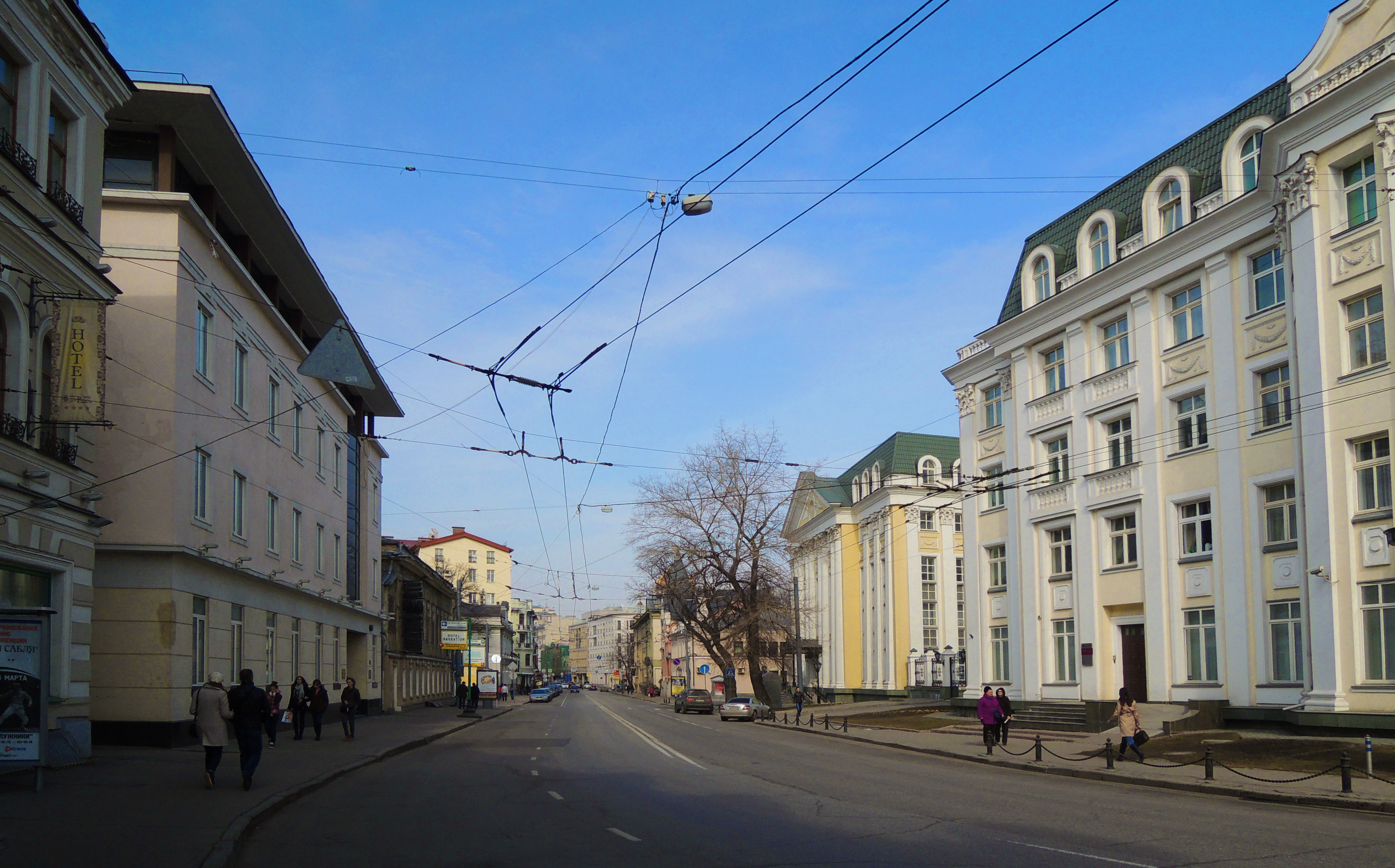 ул. Остоженка